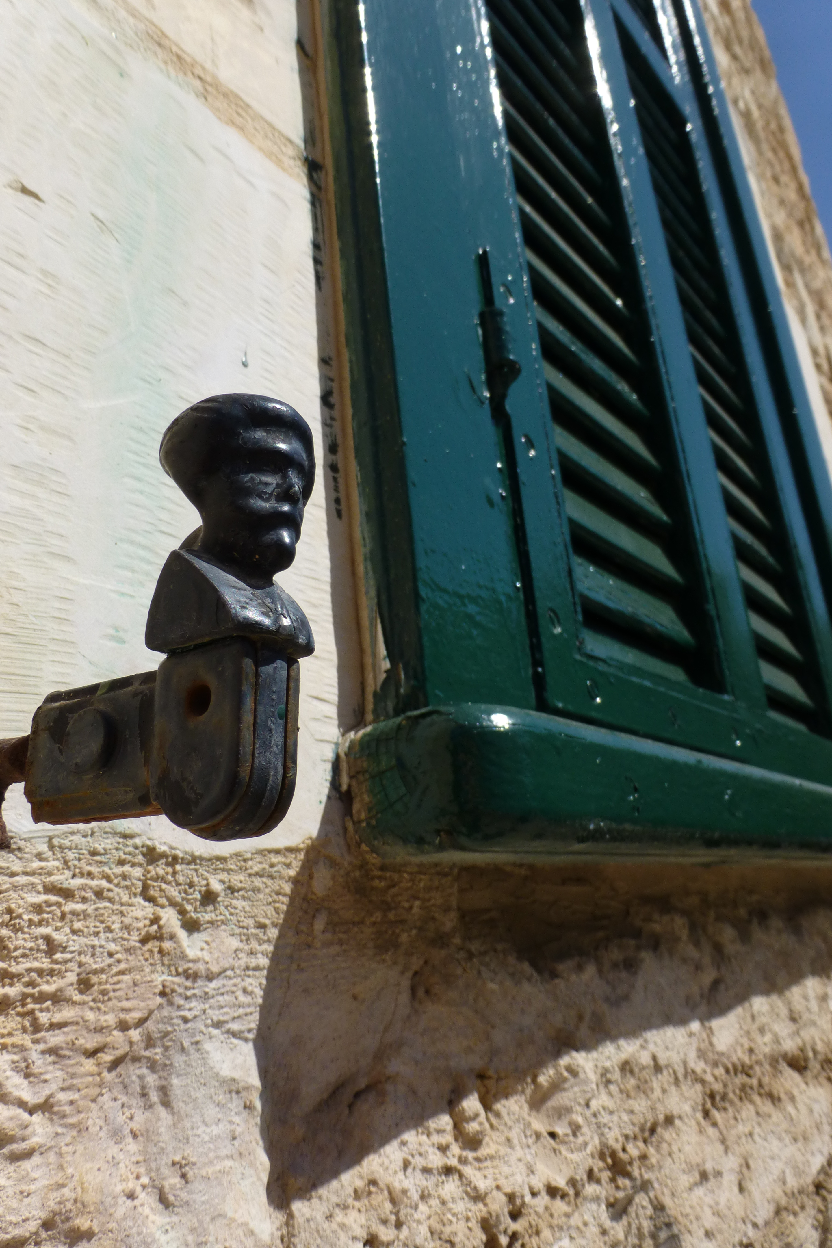 מוזיאון העיר הוא מוזיאון העוסק בתרבות אורבנית ובתיעוד ובהצגת ההיסטוריה של העיר חיפה, . המוזיאון נפתח בנובמבר 2000, והוא ממוקם במבני בית העם הטמפלרי ובית הספר הטמפלרי. המוזיאון הוא חלק ממוזיאוני חיפה. בית העם הטמפלרי הוקם בשנת 1869 והיה הבניין הראשון שהקימו הטמפלרים בארץ.